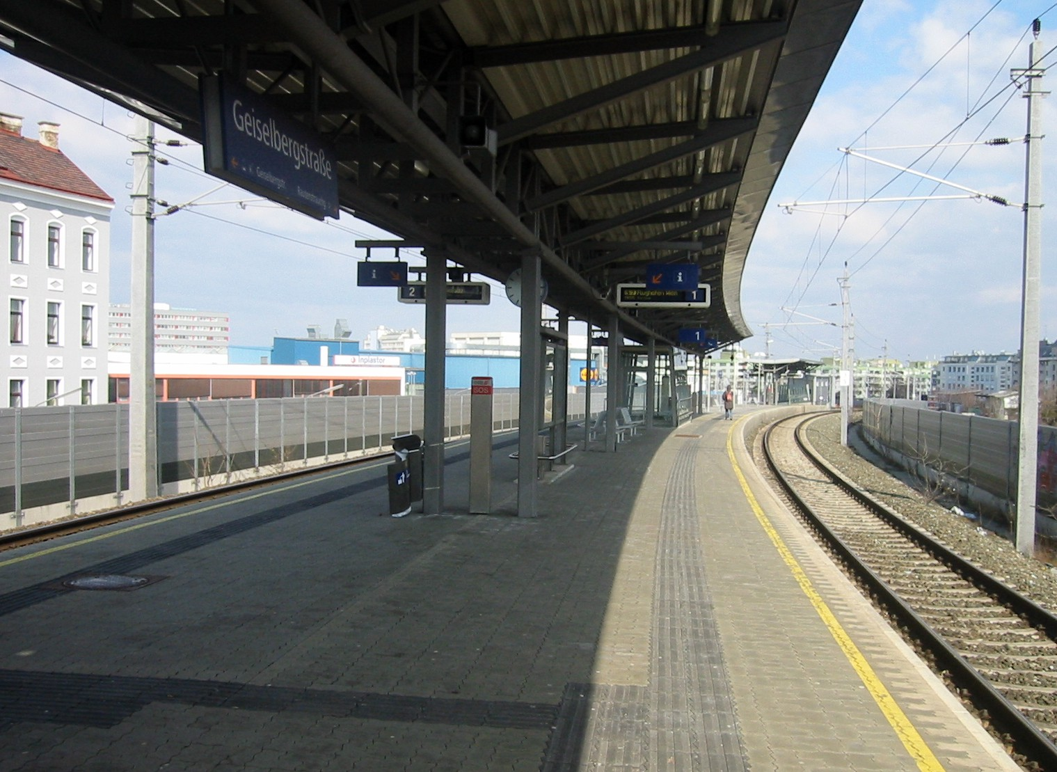 Wien, S-Bahn-Station Geiselbergstraße